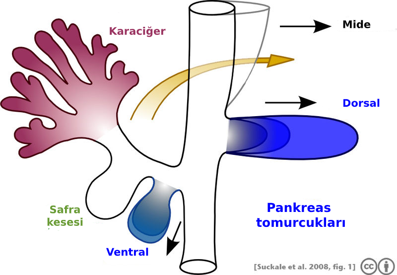 Pankreasın dorsal ve ventral tomurcuklardan gelişimi.